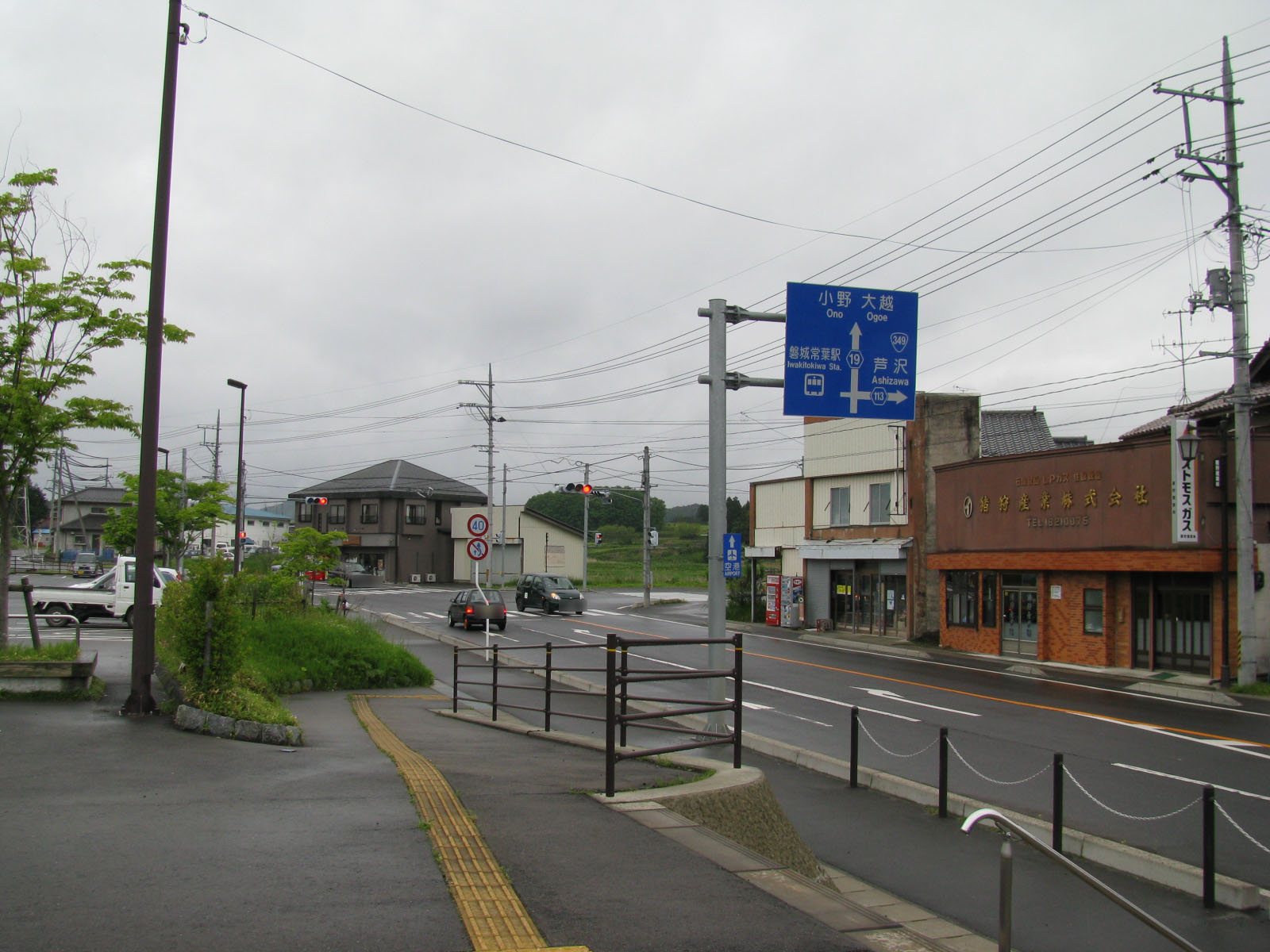 磐越東線磐城常葉駅